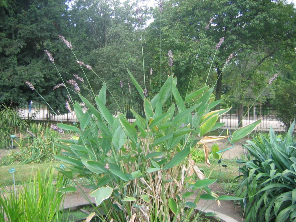 Thalia dealbata ; jardins des plantes de Paris